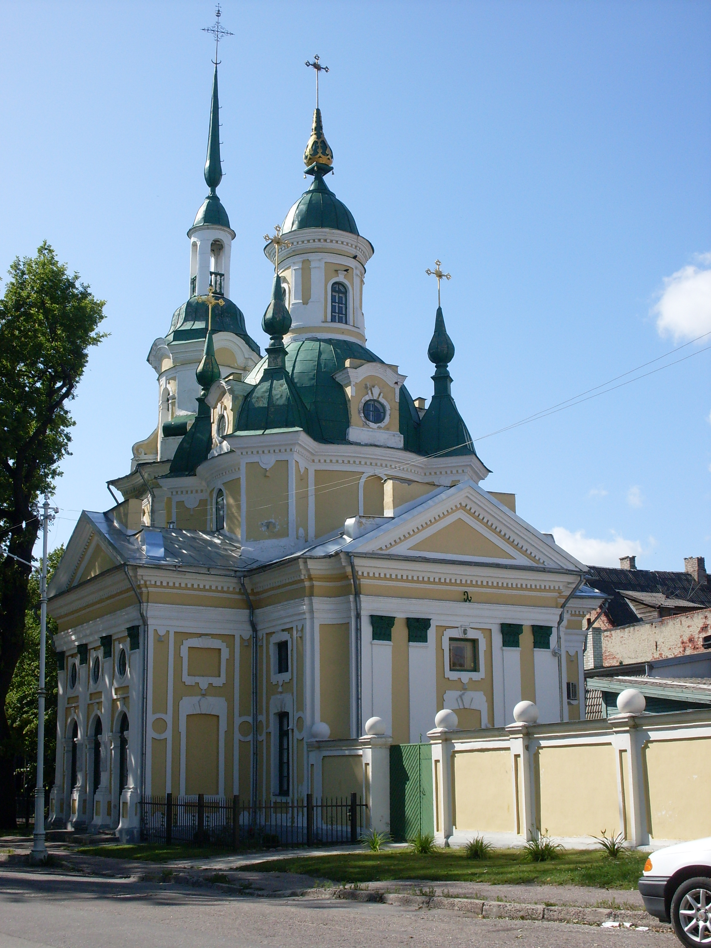 Pärnu Jekateriina õigeusu kirik